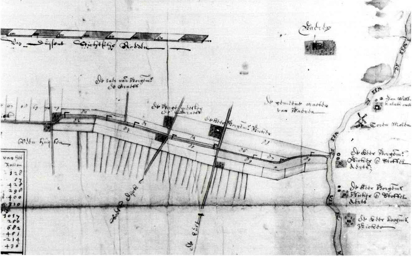 Kaart van de geprojekteerde Eemvaart. De vaart volgde hier het tracé van de Praamgracht . Niet minder dan acht schutten waren hier nodig om het waterpeil te reguleren. Tekening door Bernard de Roy, (ca. 1663).